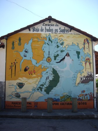 Ilustração artística do mapa da Baía de Todos os Santos em uma parede, Bahia, Brasil.